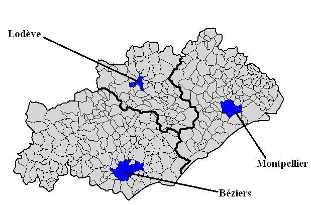 Les 3 arrondissements de l'Hérault